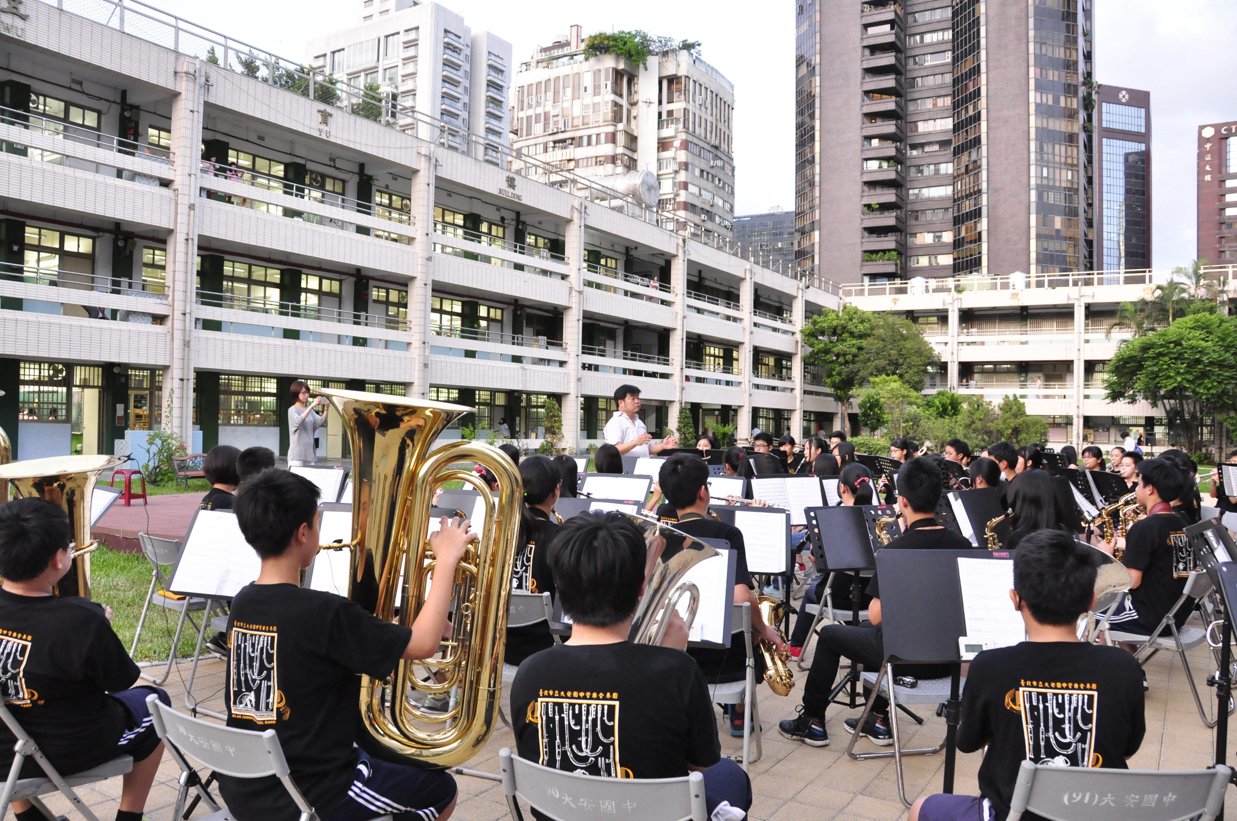 大安國中管樂團中庭音樂會